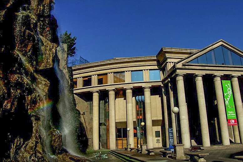 Palacio da Ópera, A Coruña Palacio de la Opera en Coruña, edificado en una antigua cantera del Monte Santa Margarita, aprovechandola para crear en un lateral del edificio una gran catarata urbana. Ya solo falta escuchar la musica de Mozart